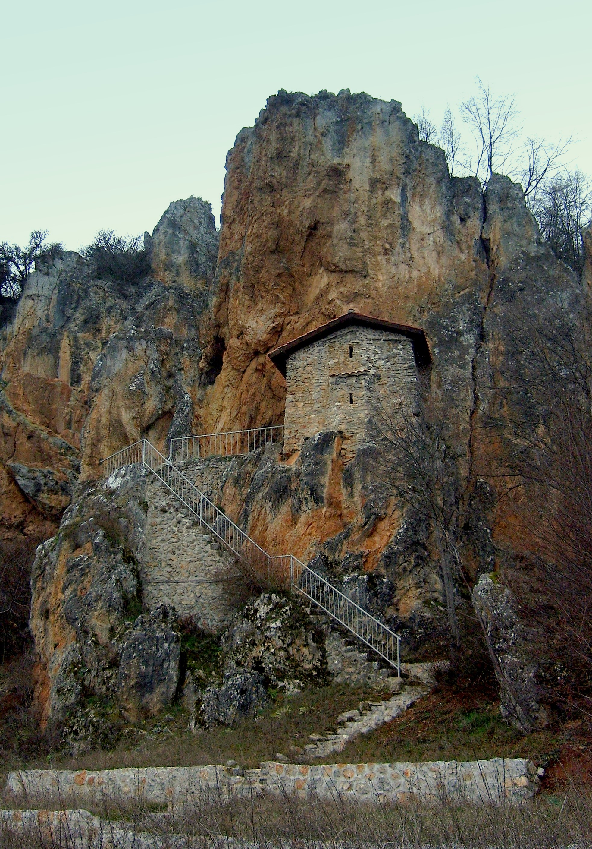 Црквата Свети Атанасиј